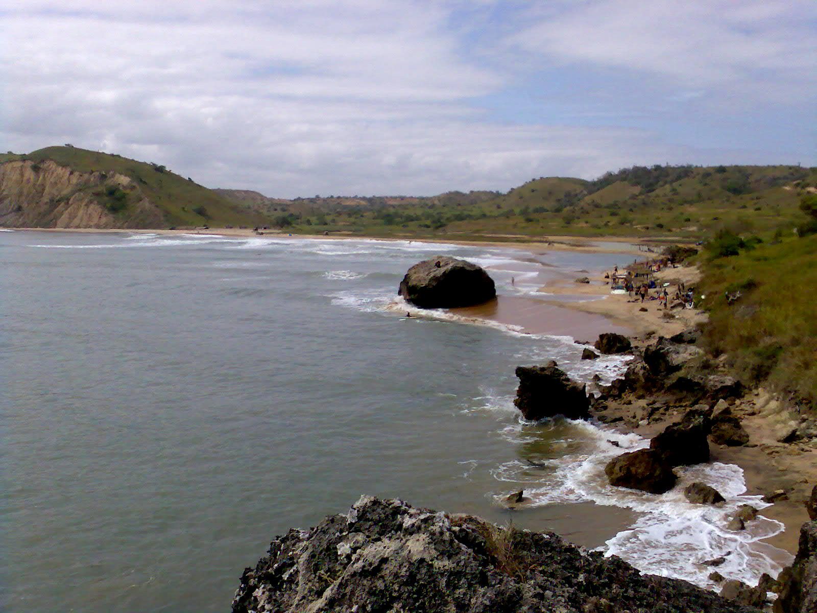 Cabo Ledo beachside, Bengo province, Angola